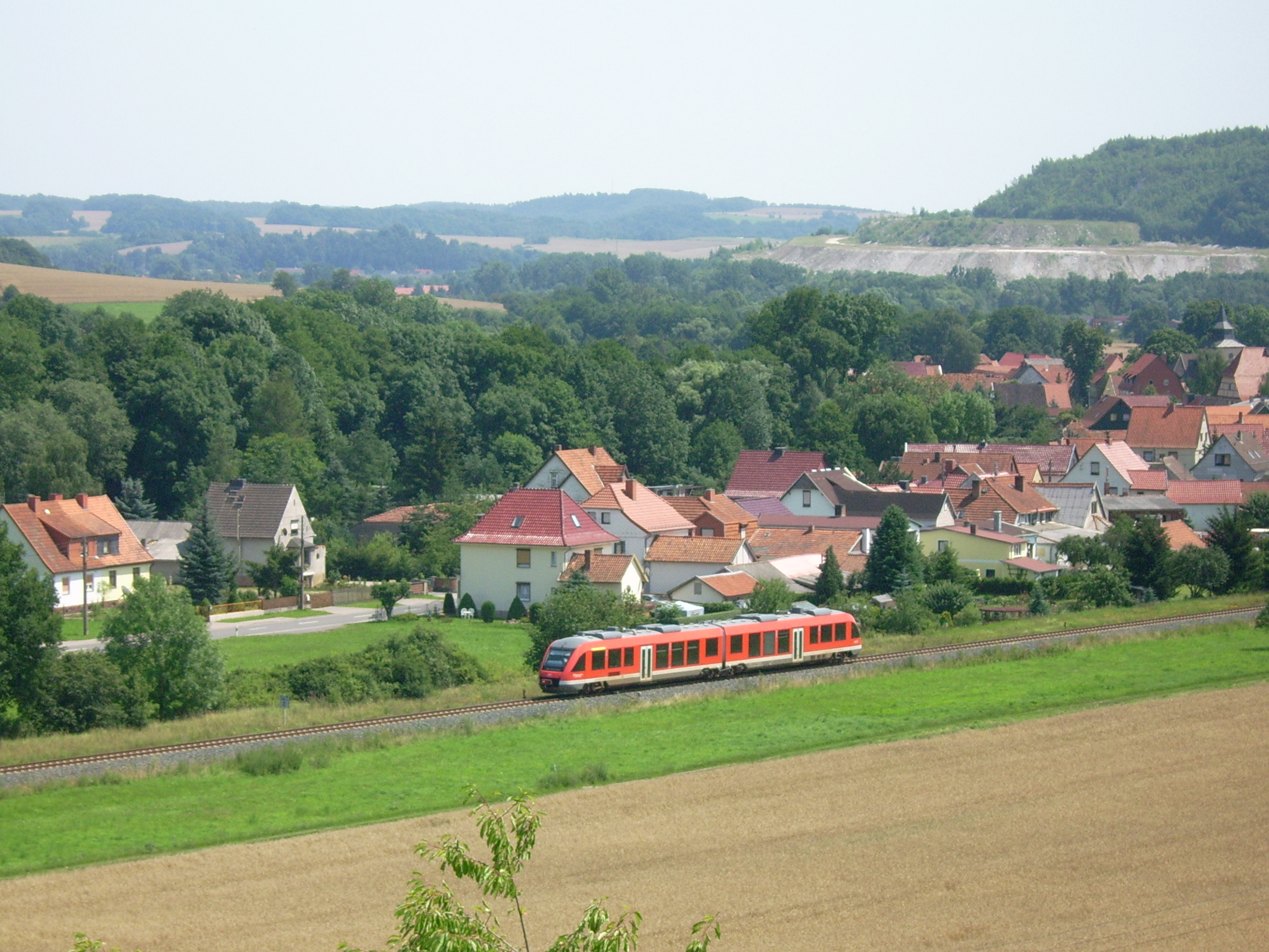 Blick vom Sängerplatz über das Oberdorf von Woffleben zum Kohnstein